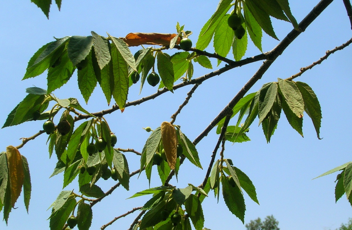 Muntingia calabura twig from Karnataka India